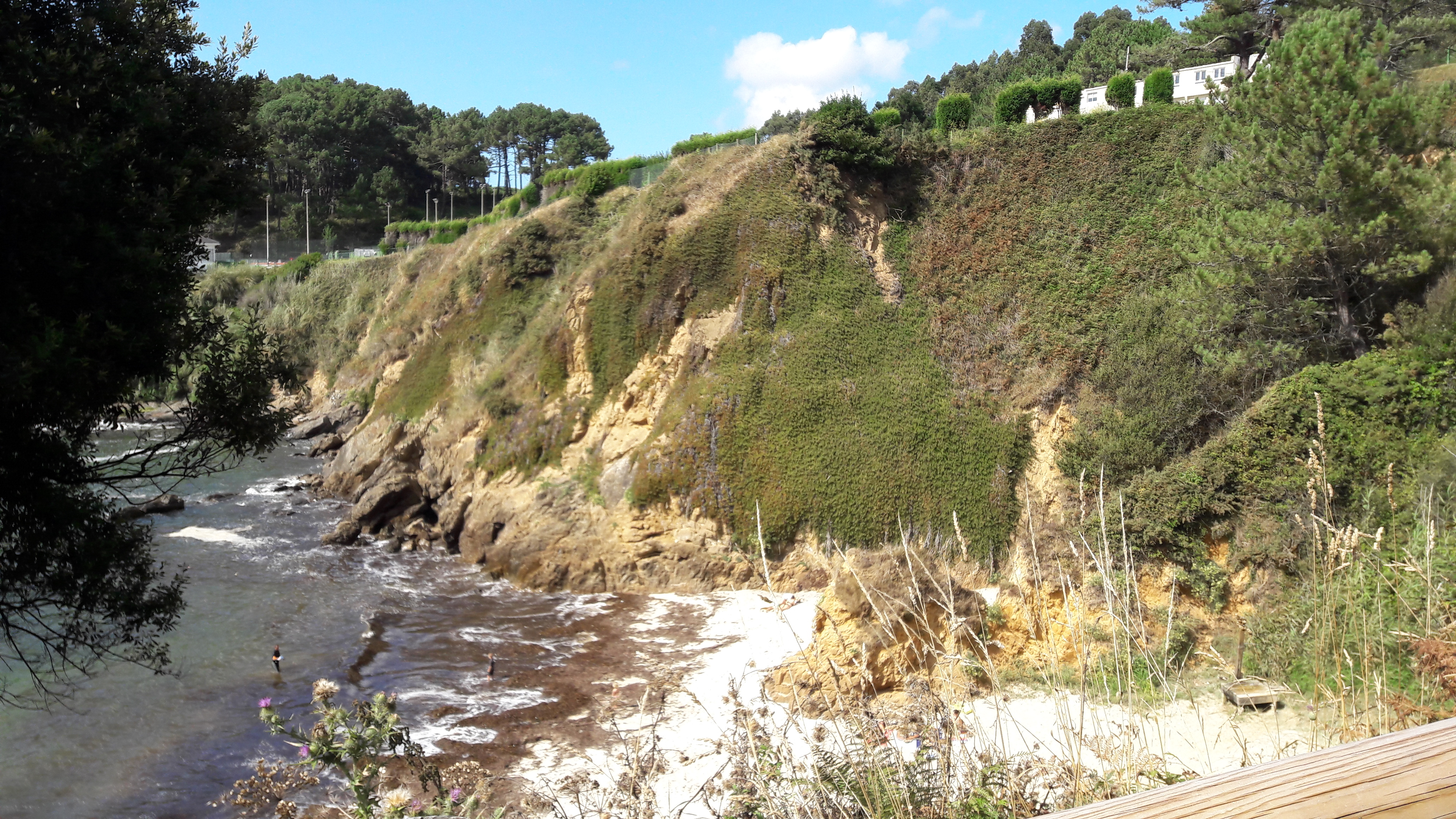 Praia de Canabal, en Oleiros